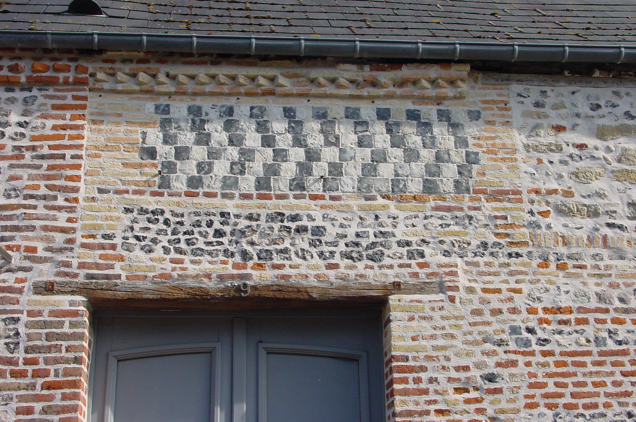 Mur de briques et de silex, St Valery sur Somme (France)a wall of bricks and flintstone in St Valery sur Somme, France